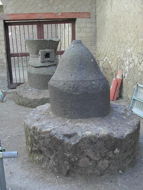 Macine foto di Aldo Ardetti (14 agosto 2007)